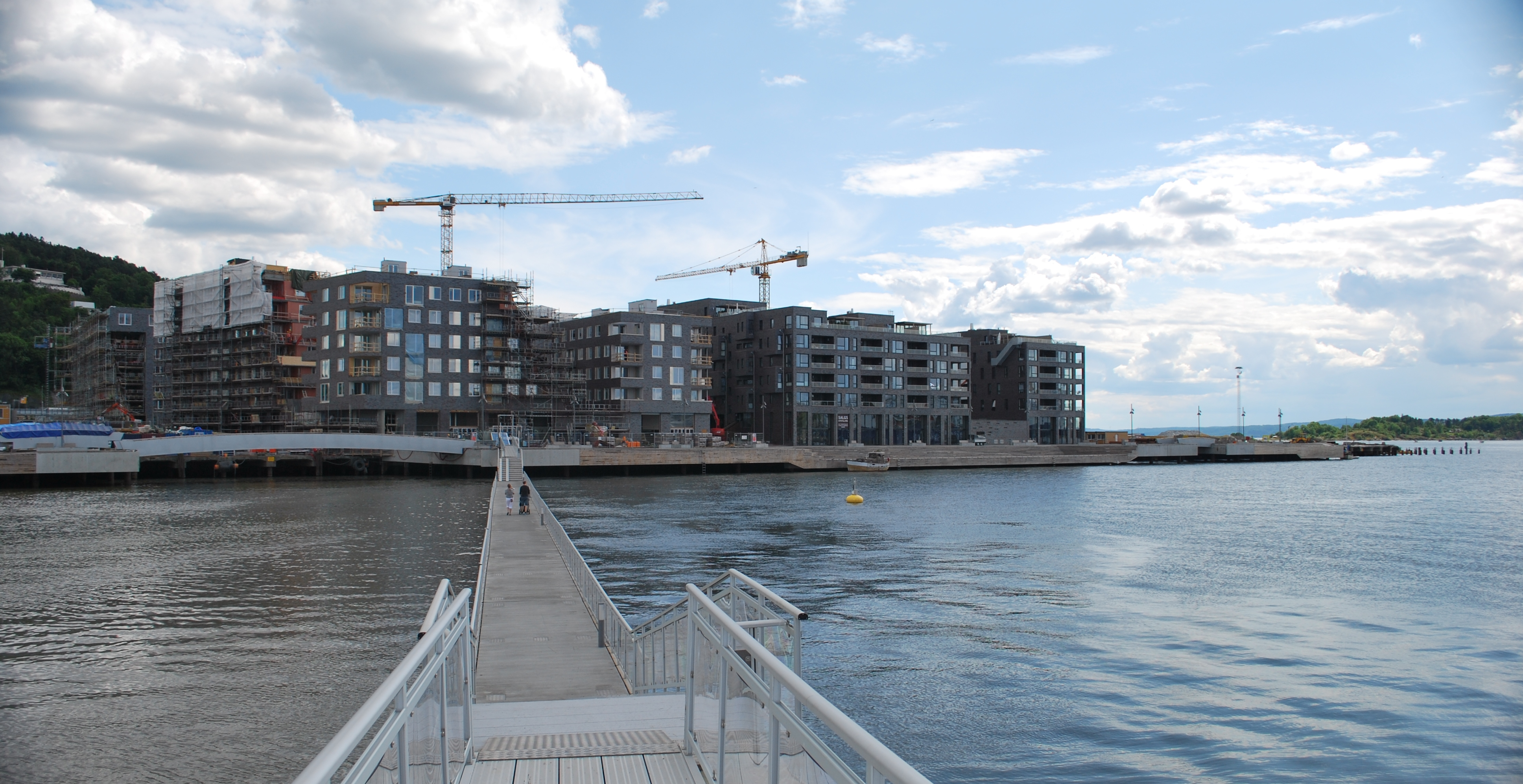 Bebyggelsen på Sørengautstikkeren sett fra gangbroen som går fra fra Paulsenkaia bak Operaen